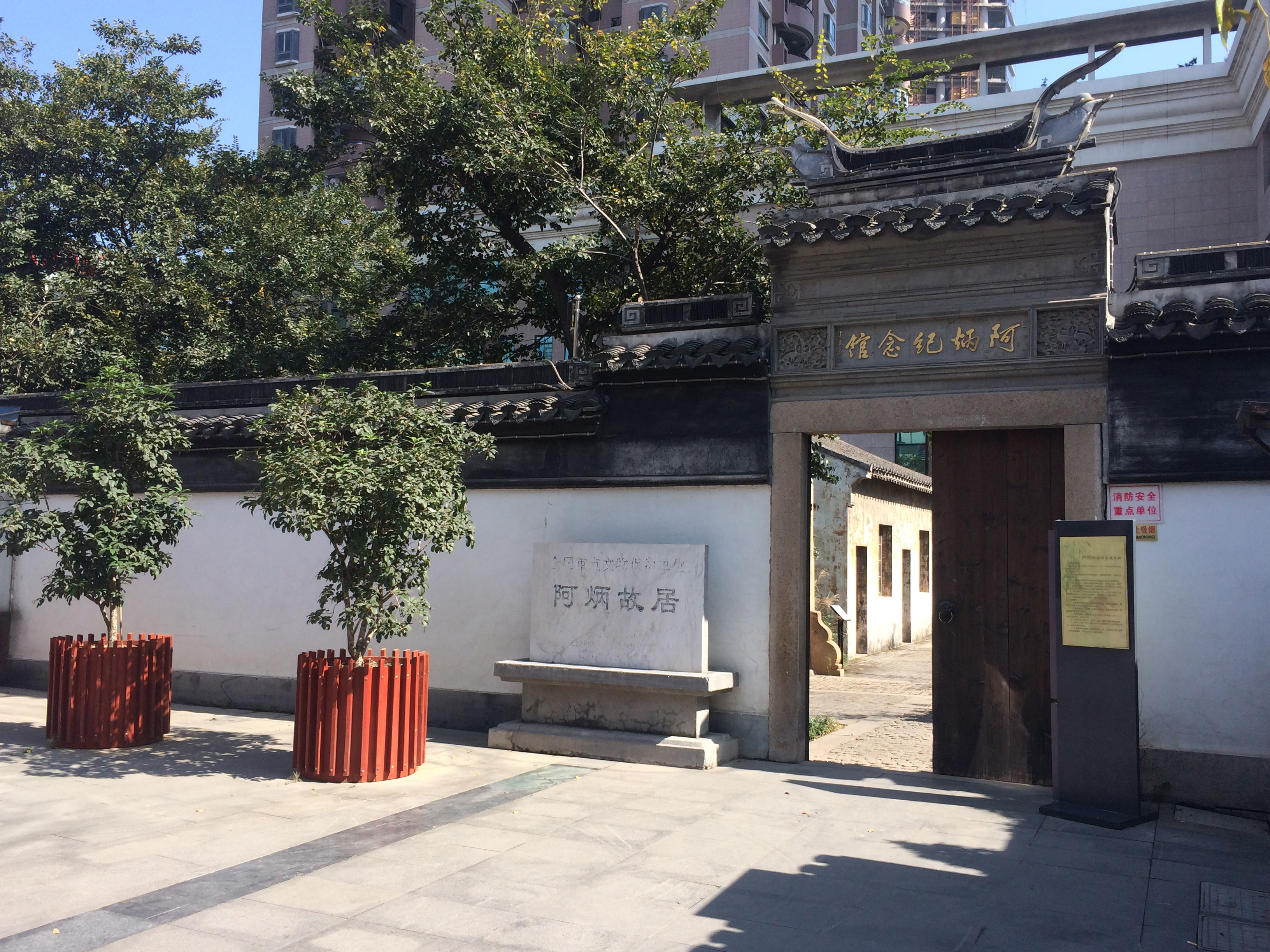 阿炳故居入口